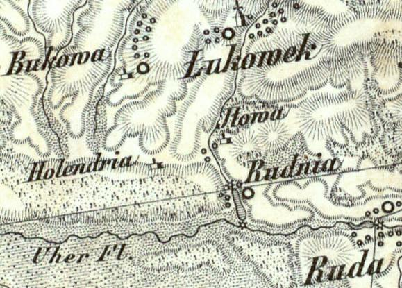 Iłowa i Rudnia na mapie Reymanna (XIX w.)